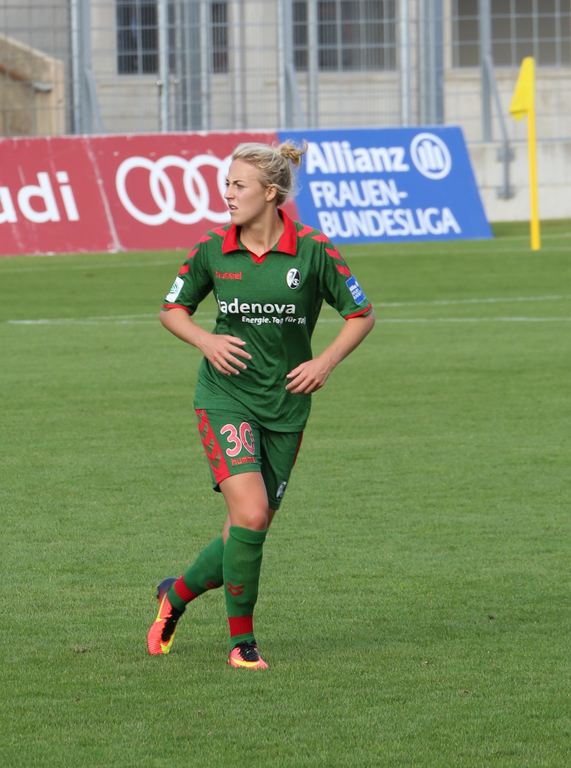 Carolin Simon, SC Freiburg, beim Frauen-Bundesliga-Spiel FC Bayern München gegen SC Freiburg am 3. September 2016 im Stadion an der Grünwalder Straße (Ergebnis war 1:1).